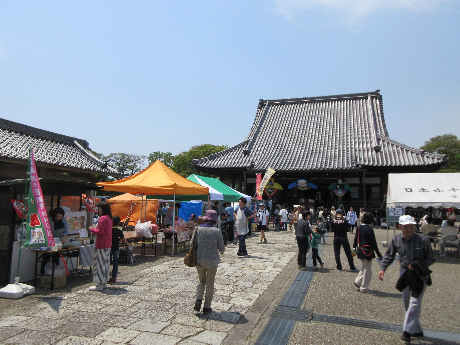 本證寺（安城市野寺町）